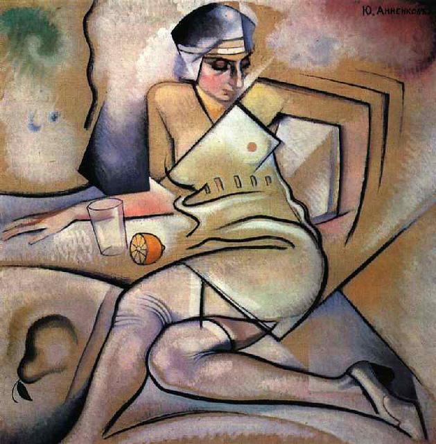 Анненкова Елена Борисовна (урожд. Гальперина, танцовщица, 1917) Государственный Русский музей